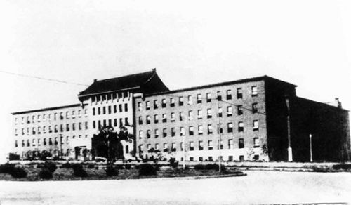 Economic affairs ministry of Manchukuo（满洲国经济部）